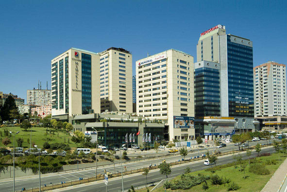 Memorial Sağlık Grubu Okmeydanı Hastanesi Licensing Kategori:İstanbul resimleri